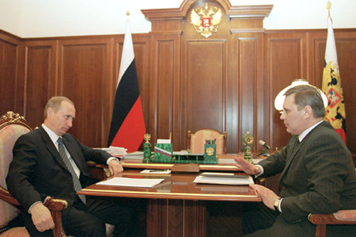 МОСКВА, КРЕМЛЬ. С Председателем Правительства Михаилом Касьяновым.